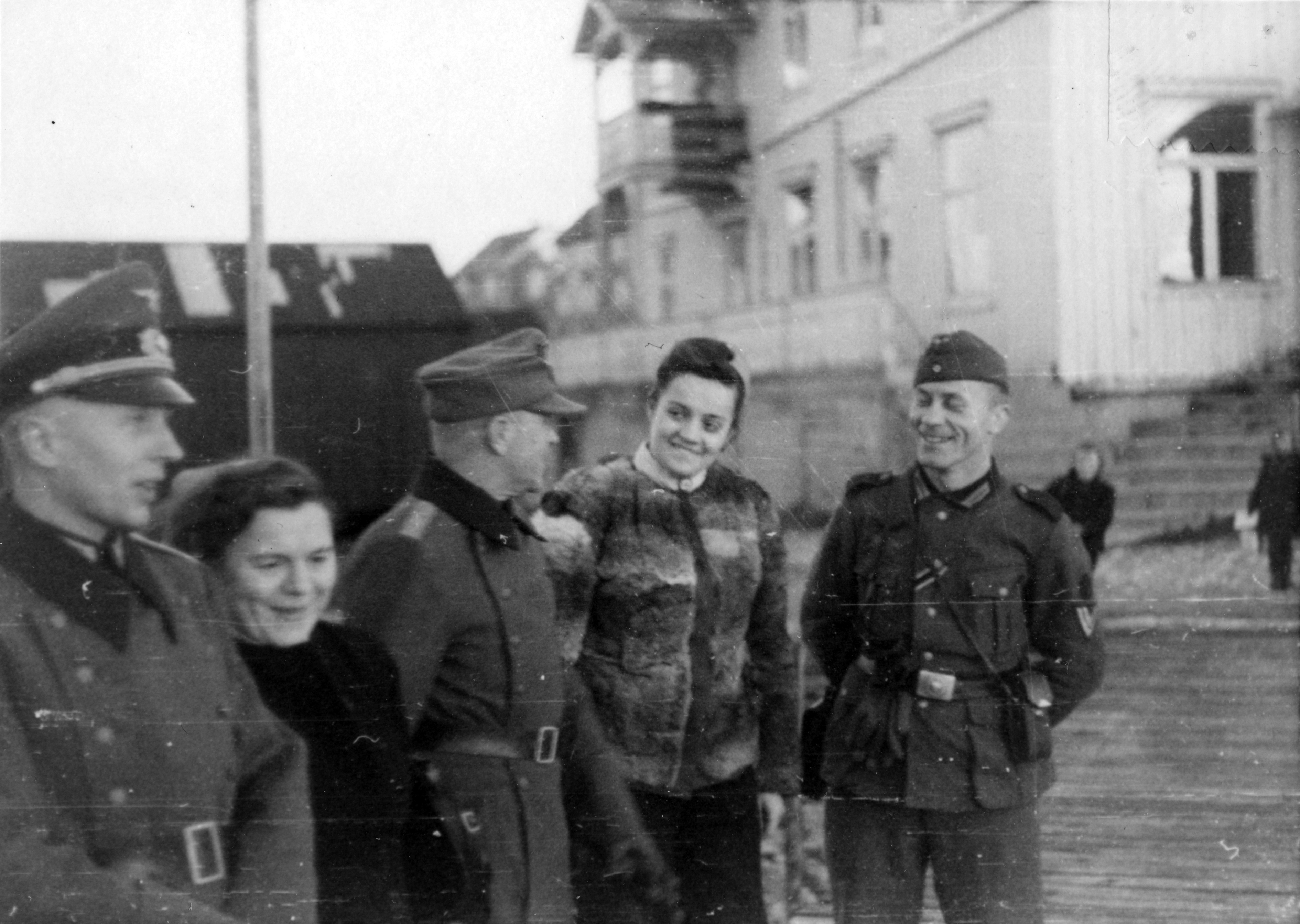 Tittel / Title: Album side 21 Dato / Date: 24.12.1943 Fotograf / Photographer: Franz Affolderbach Utgiver / Publisher: Sted / Place: Brønnøysund, Nordland Eier / Owner Institution: Arkiv i Nordland Lenke / Link: Arkiv i Nordland Arkivreferanse /Archive reference: AIN.NA143.0431 Fra [#//snl.no/.nbl_biografi/Dag_Skogheim/utdypning Dag Skogheims] Privatarkiv Tekst til bildet